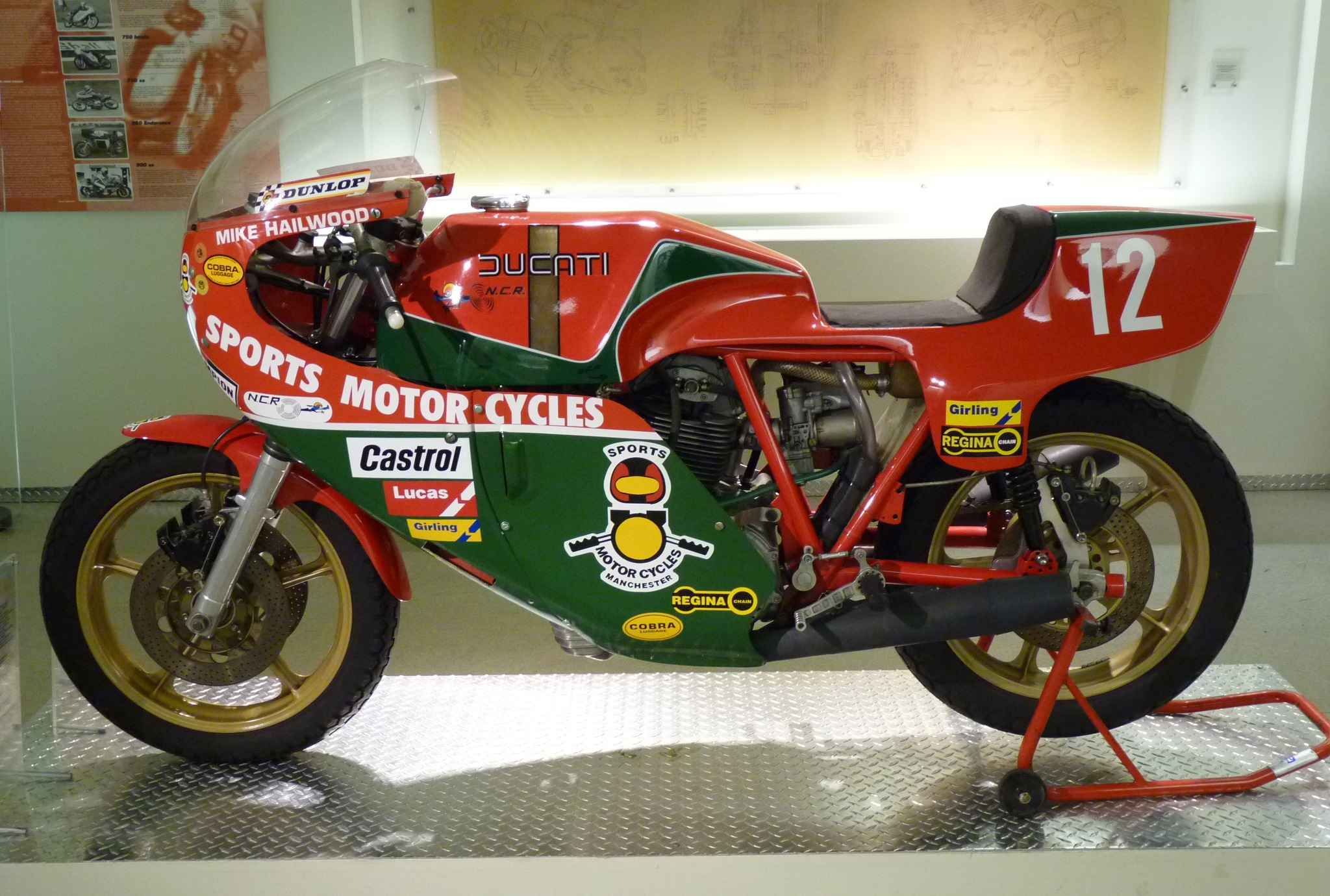 An accurate replica of Mike Hailwood's Ducati 900 Super Sport used in his victorious comeback at the 1978 Isle of Man TT. Bologna, Museo Ducati. NOTE: not to be confused with the later Ducati 900 MHR (Mike Hailwood Replica), which in fact is a tribute to this motorcycle.